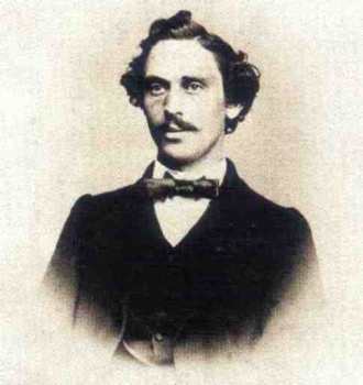 Der böhmische Architekt und Restaurator Josef Mocker (18-1899)